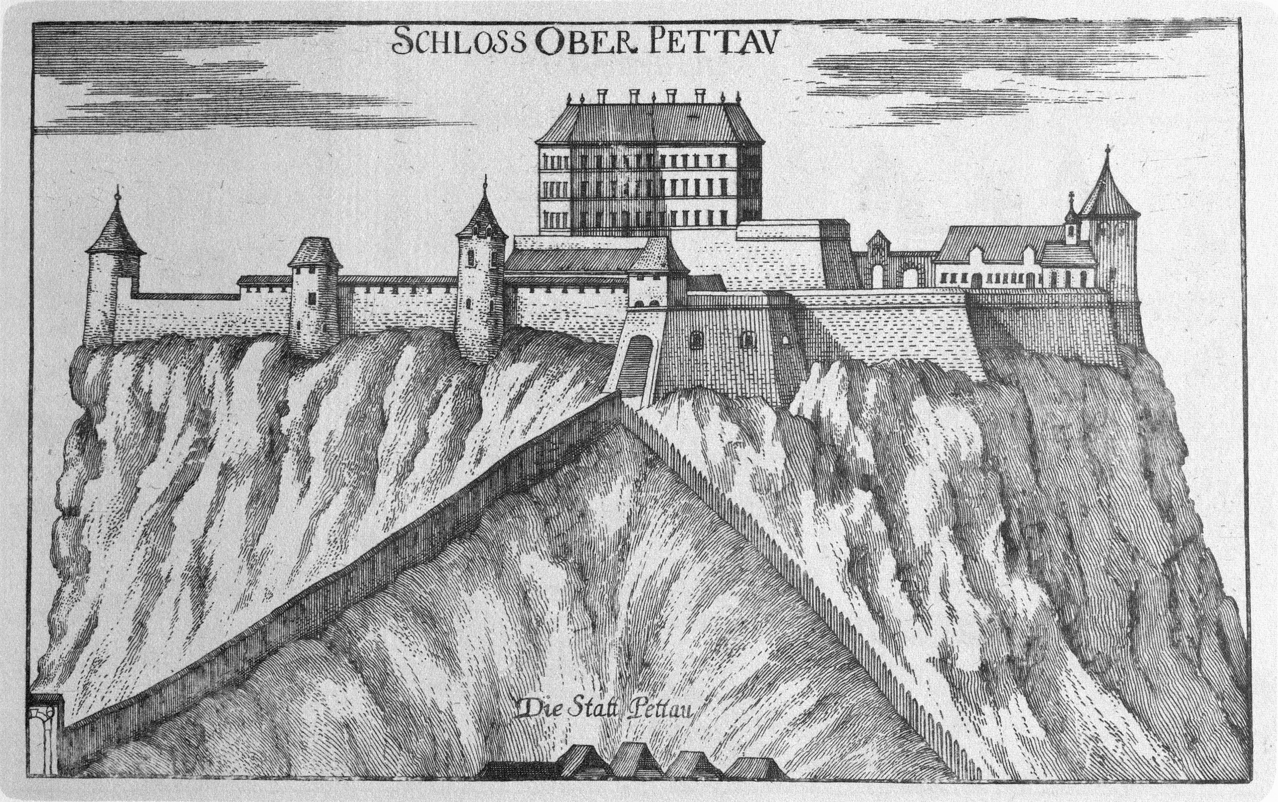 G. M. Vischers Käyserlichen Geographi, Topographia Ducatus Stiriae, Das ist: Eigentliche Delineation / und Abbildung aller Städte / Schlösser / Marcktfleck / Lustgärten / Probsteyen / Stiffter / Clöster und Kirchen / so es sich im Herzogthumb Steyrmarck befinden; Und anjetzo Umb einen billichen Preyß zu finden seynd Bey Johann Bitsch Universitäts Buchhandlern / Auff dem Juden=Platz bey der guldenen Saulen. Graz 1681 Die Nummerierung der Dateien folgt der alphabetischen Reihung der Ortsnamen und entspricht nicht dem Vischer-Register